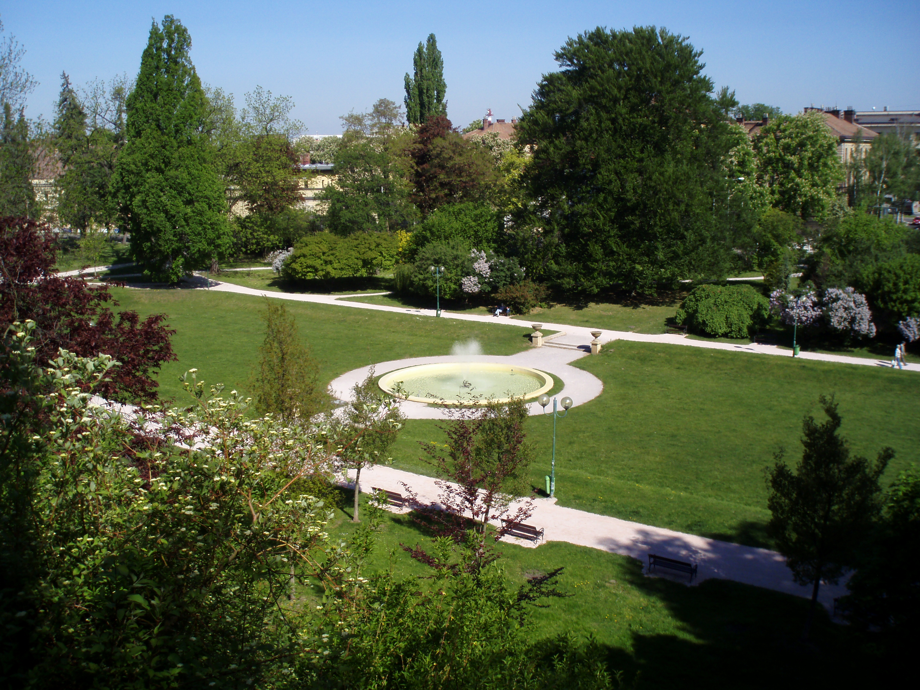 Žižkovy sady (Hradec Králové)